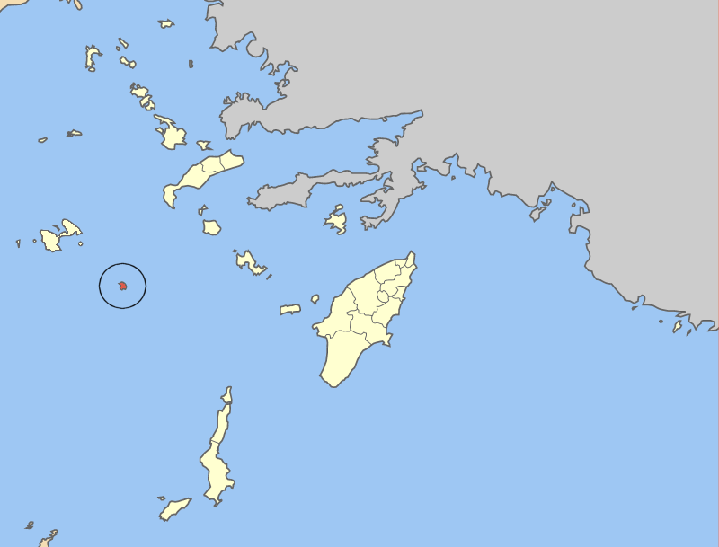 Lage der griechischen Insel Syrna innerhalb der Dodekanes